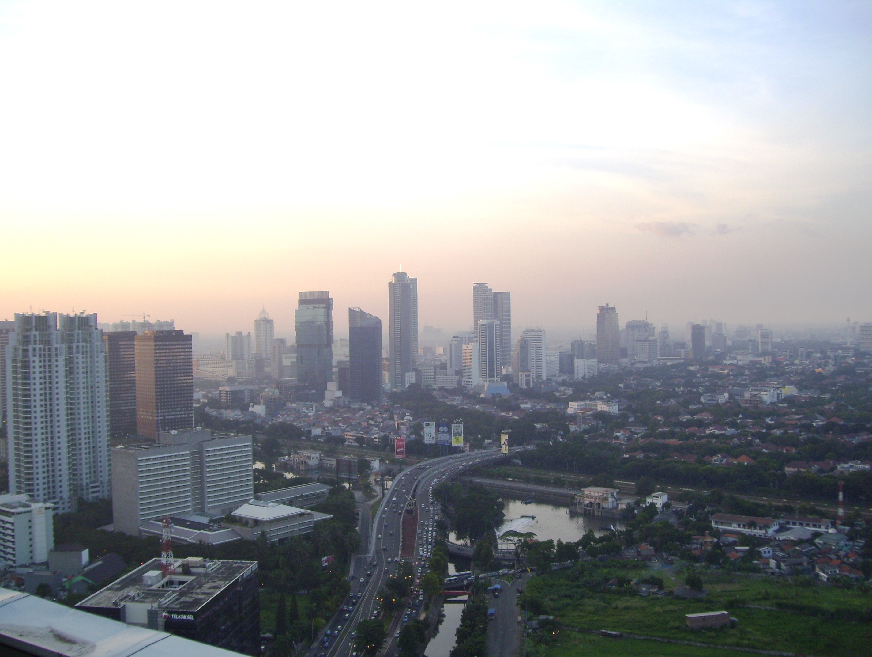 Jakarta from 35th Floor Menara Imperium Kuningan